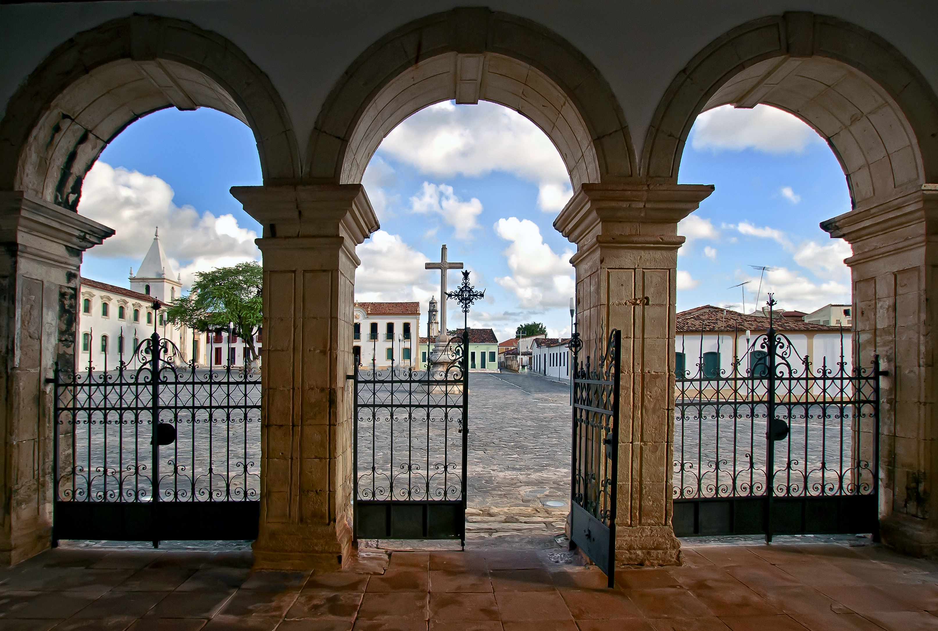 São Francisco, SE: conjunto arquitetônico e paisagístico A Praça São Francisco representa o coração da parte alta de São Cristóvão, constituída para ser o centro da cidade e abrigo das estruturas políticas, judiciais e religiosas. O espaço foi construído no final do século XVI e início do século XVII e permanece ao longo desses mais de quatrocentos anos uma rica fonte de resgate histórico e também de identidade. O próprio nascimento da Praça e seus entornos são merecedores de atenção, sendo um legado do período da União Ibérica. Nesse contexto, o local apresenta influências tanto portuguesas como espanholas, contribuindo para essa visível riqueza histórica. Do ponto de vista arquitetônico, da Praça São Francisco é possível apreciar o palácio do período colonial onde funciona o Museu Histórico; e também prédios das ordens religiosas, como o Museu de Arte Sacra e o Convento de São Francisco. Todos eles continuam praticamente com a mesma feição de quando fundados.